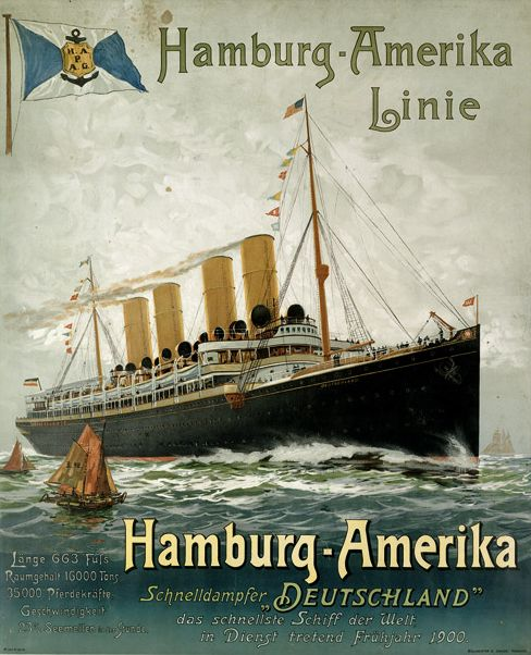 Plakat der Hamburg-Amerika Linie mit Schnelldampfer Deutschland